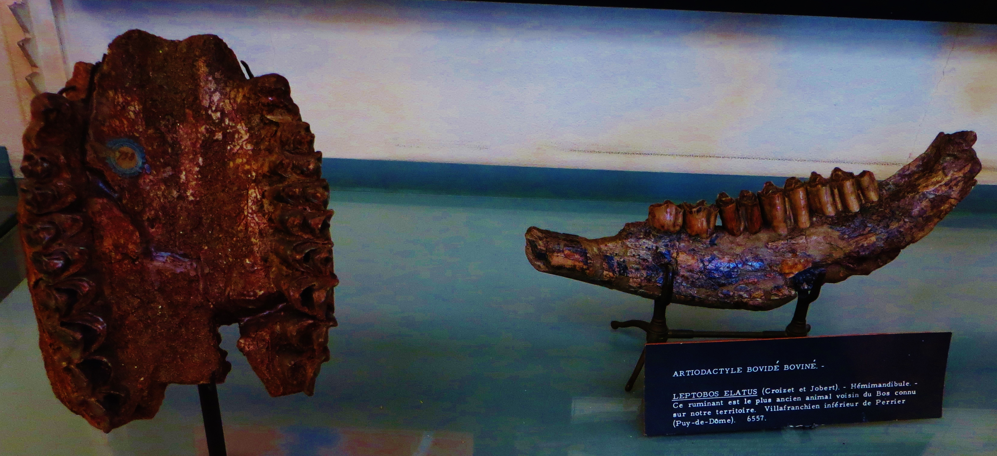 Fossil of Leptobos, an extinct mammal- Took the photo at Musee d'Histoire Naturelle, Paris